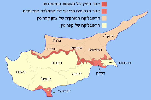 חלוקה פוליטית של קפריסין